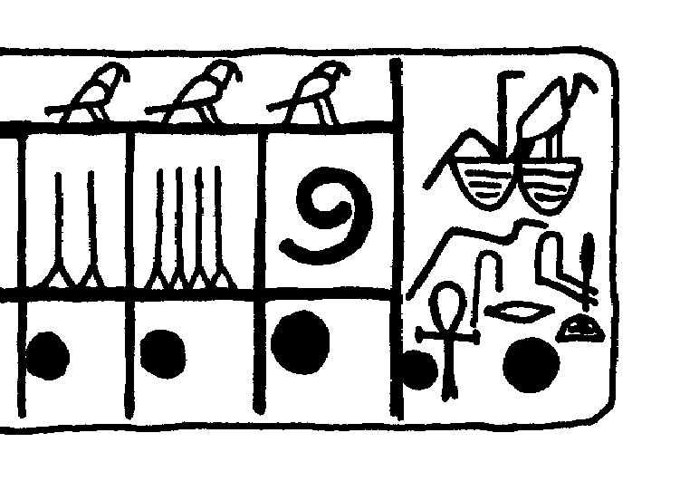 Elfenbeinschablone aus den Grabgalerien des Königs Sechemchet (3. Dynastie)